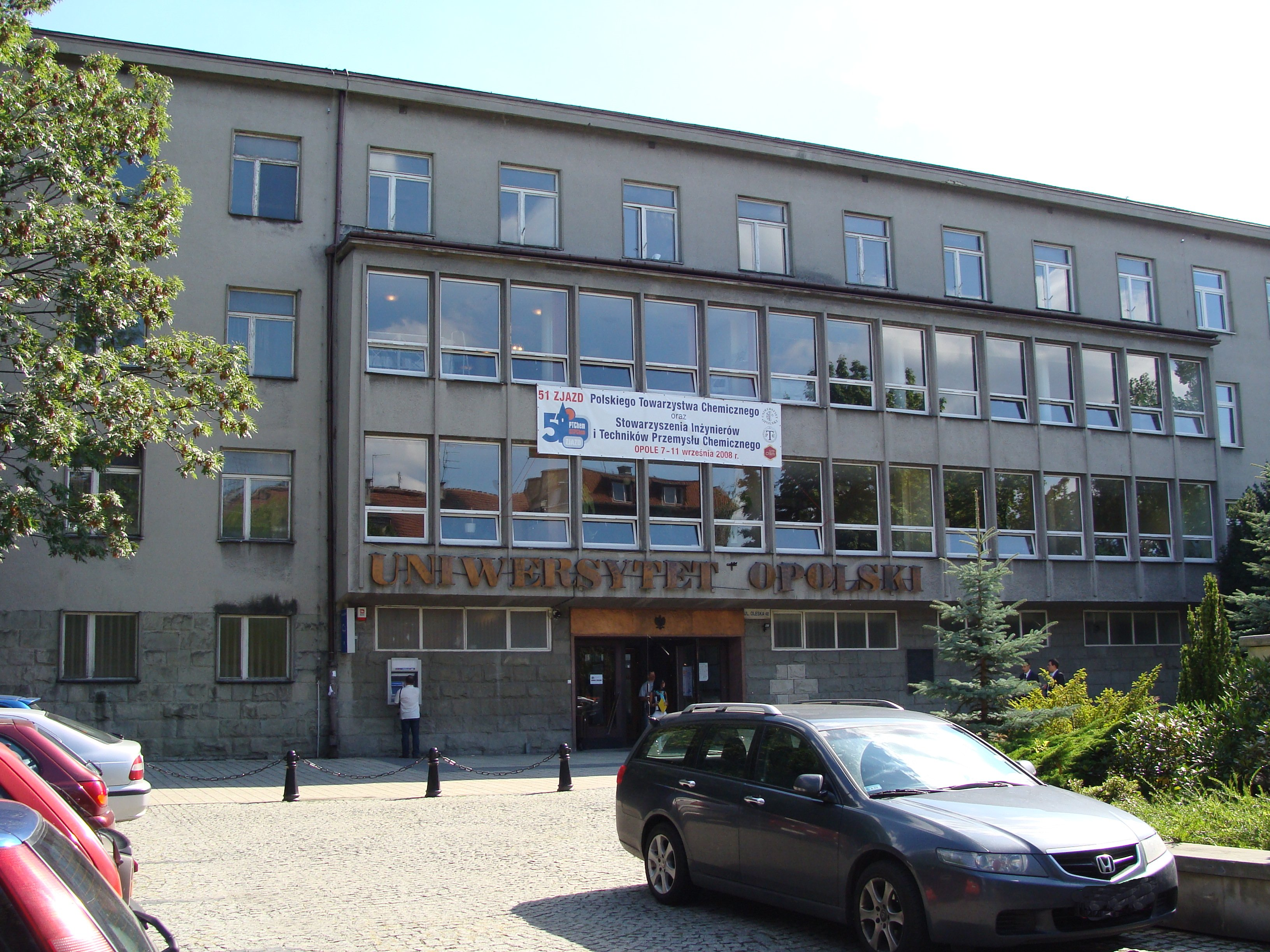 Polskie Towarzystwo Chemiczne - 51 zjazd, Opole, Uniwersytet Opolski